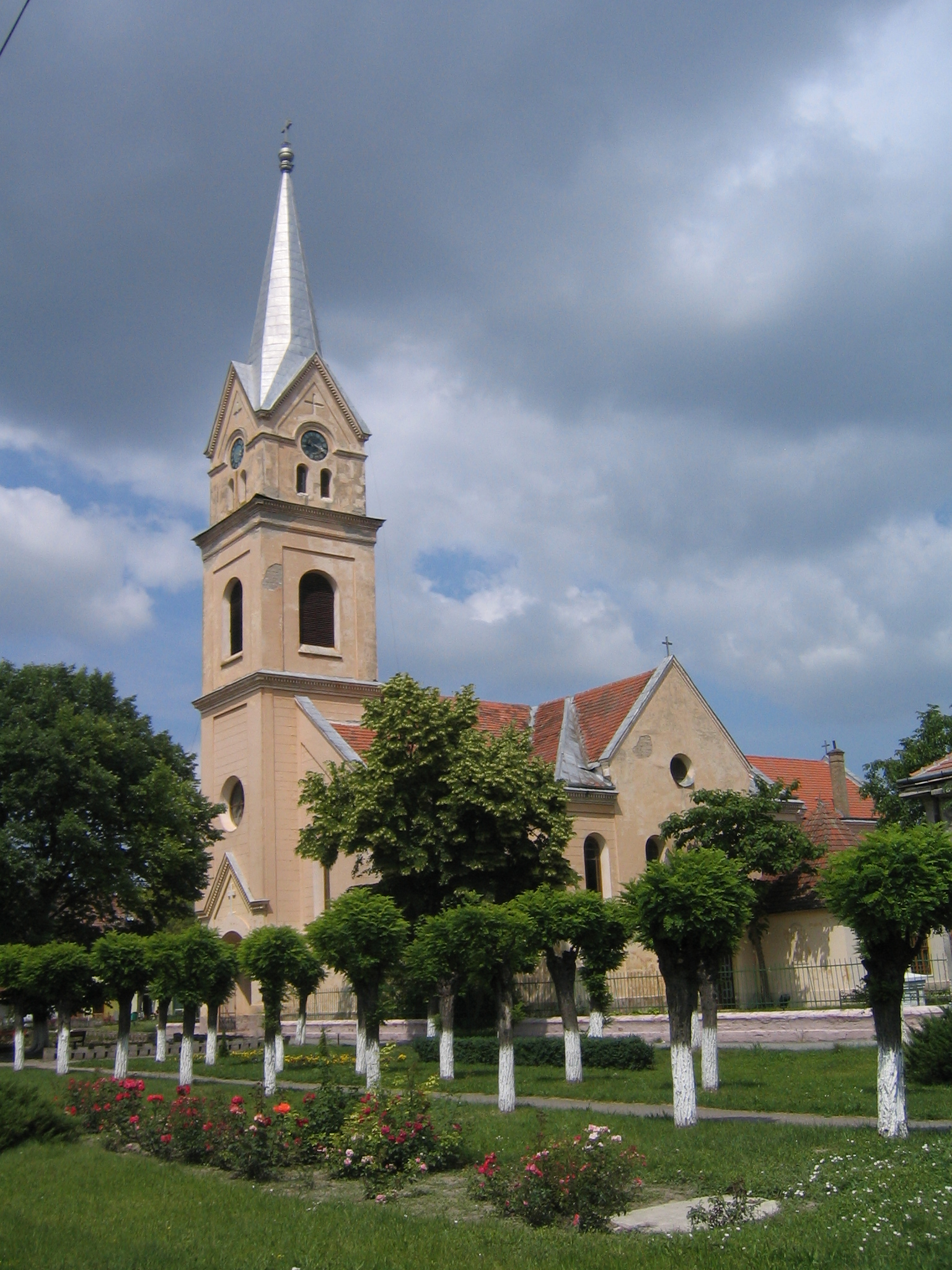 Biserica romano-catolica din Jimbolia